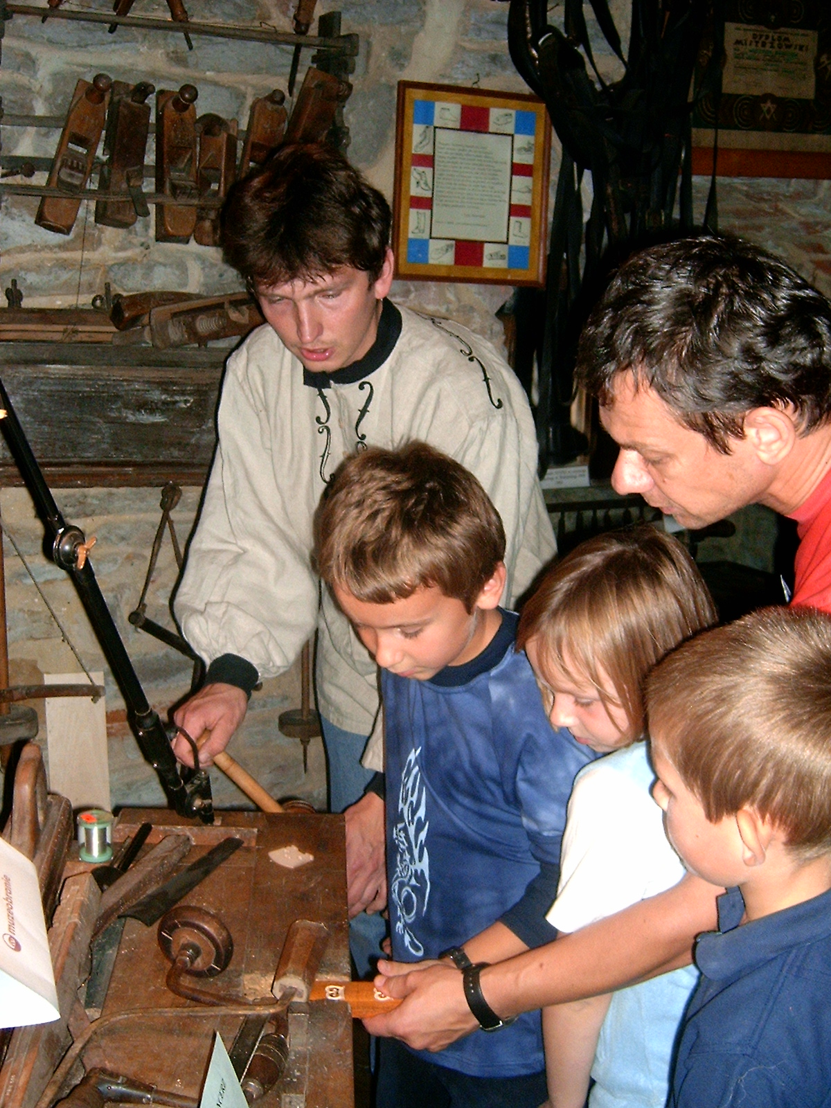 Biecz. Próba pracy rąk w starej muzealnej baszcie. Muzeobranie 2006 odbyło się w dniach 25-29 września 2006 r. fot. Sebastian Wacięga, MIK